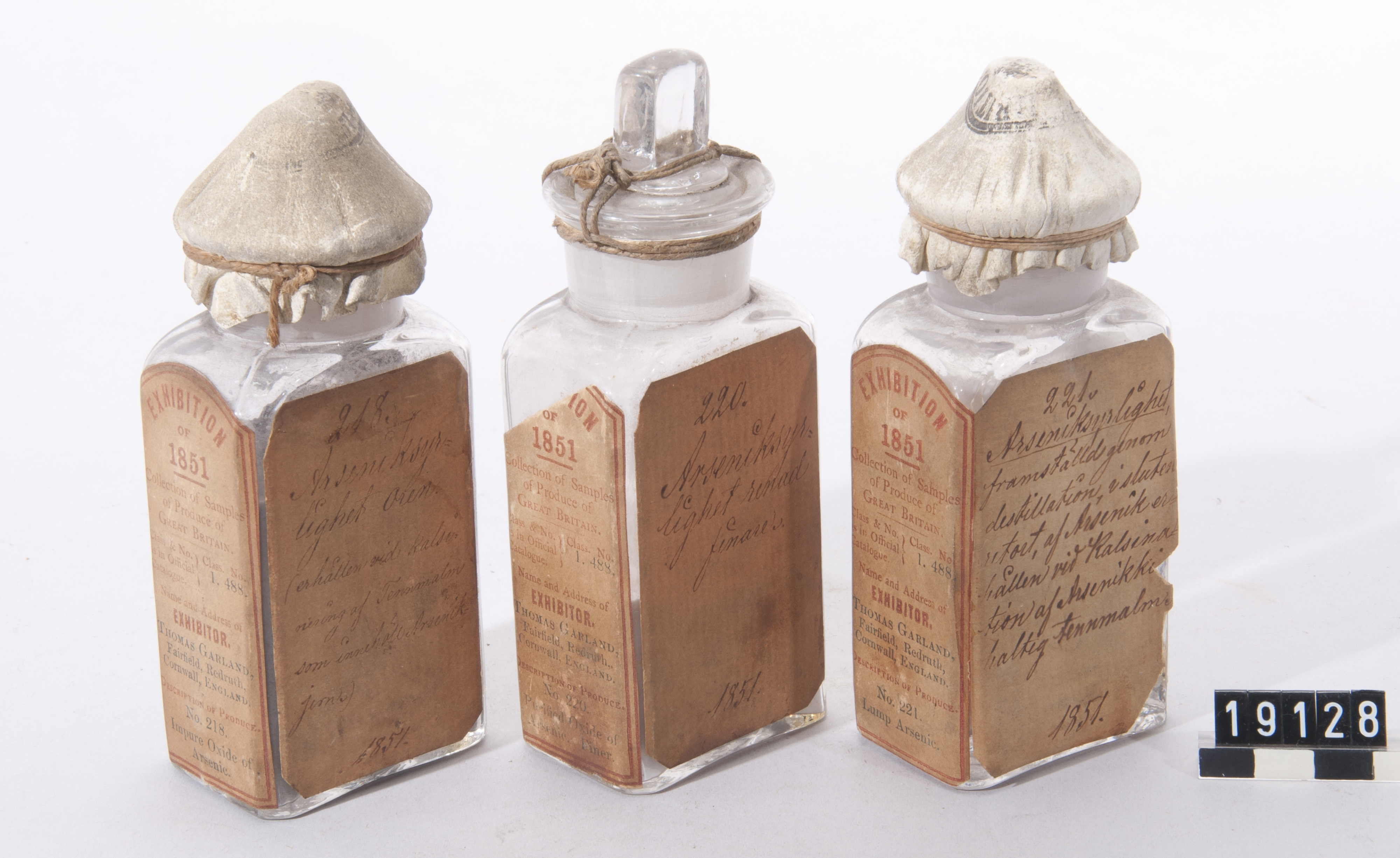 Tre olika typer av arseniksyrlighet: Oren, ren och destillerad. Utställd vid Världsutställningen i London 1851.